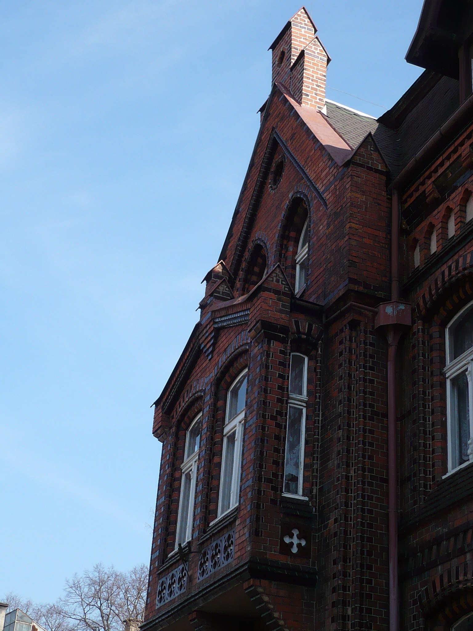 Nowa Ruda, ul. Kolejowa 18 - pierwotnie siedziba policji (do 1945), po II wojnie światowej milicji, UB, obecnie MOPS, 1892